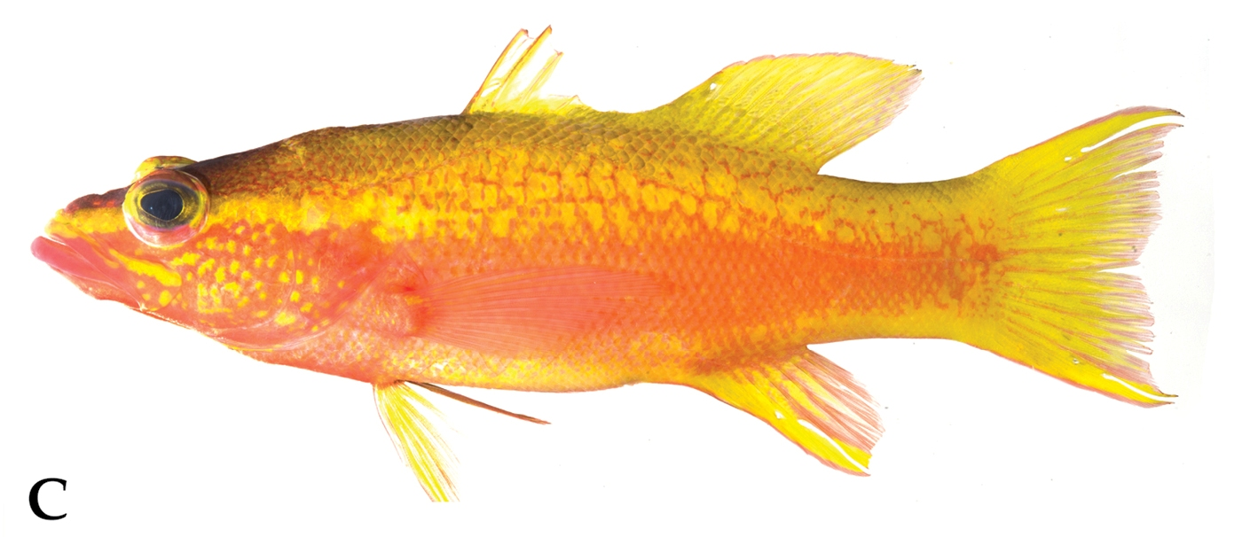 Liopropoma aberrans, 102 mm, Curaçao